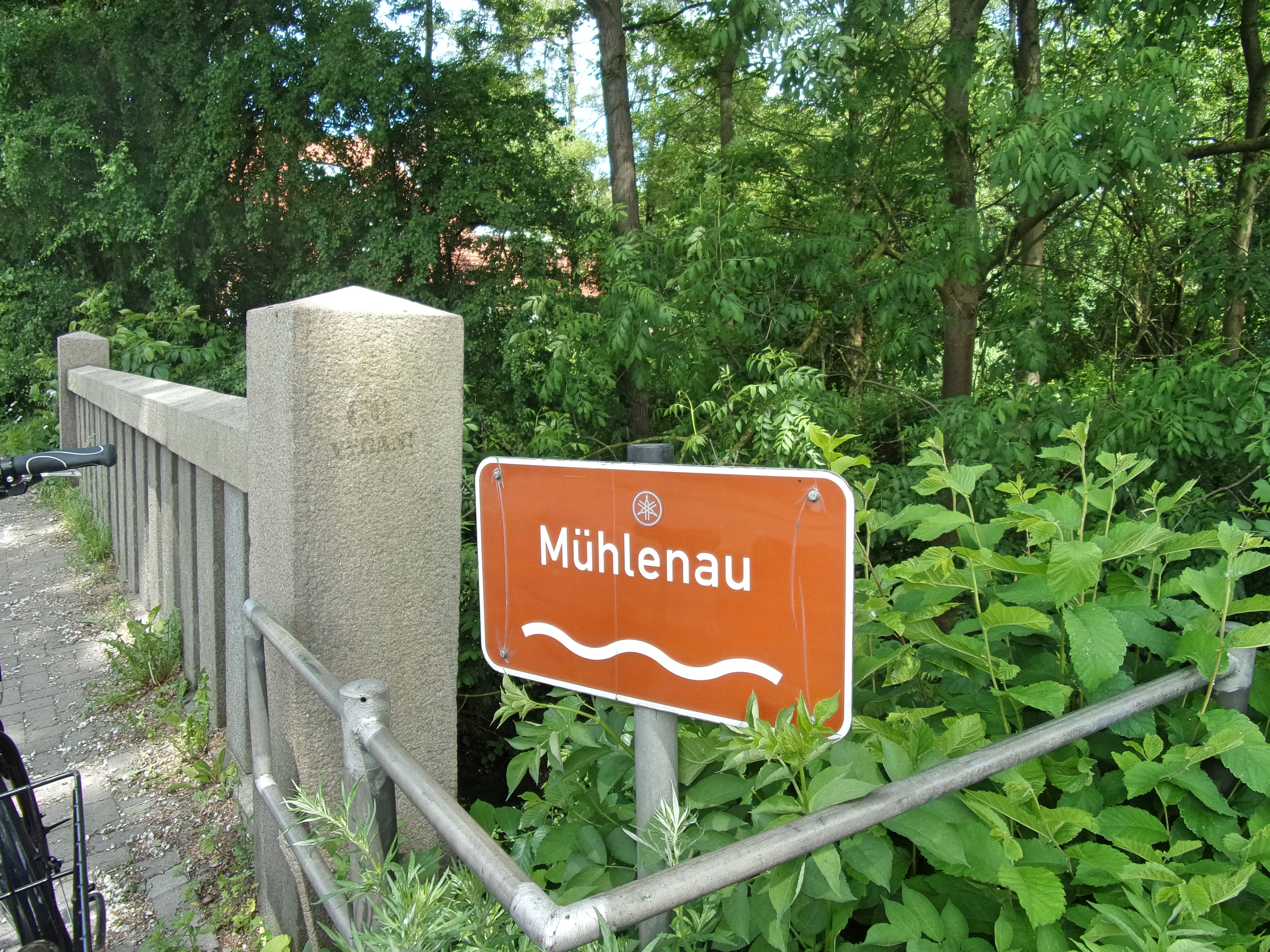 Brücke über die Mühlenau im Verlauf der Kieler Straße, Hamburg-Eidelstedt. This is a photograph of an architectural monument.